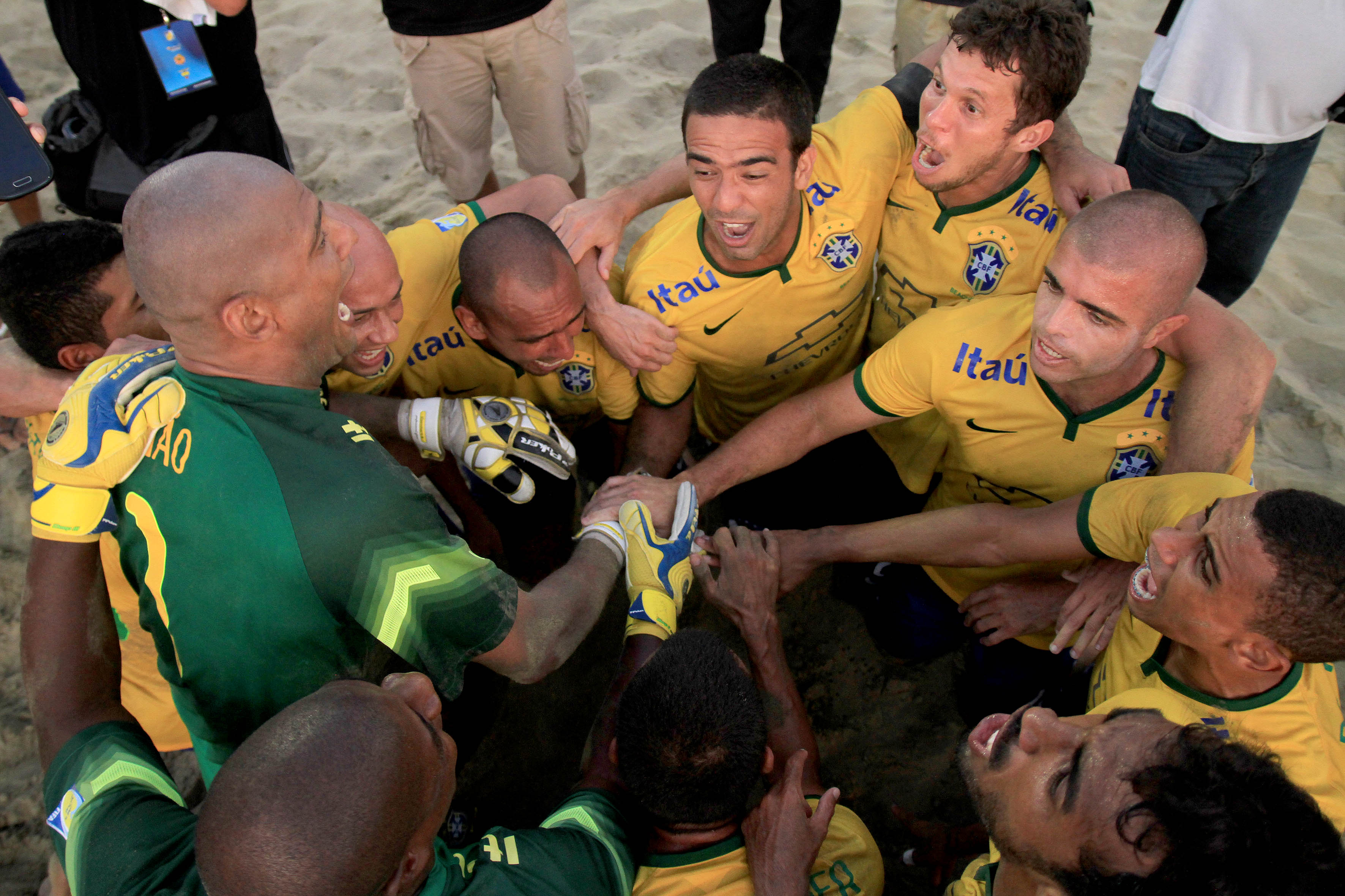 Manta, 26 de abr (Andes).-Brasil se adjudico el primer lugar del Sudamericano de fútbol playa que se realizó en Manta. Foto:César Muñoz/Andes